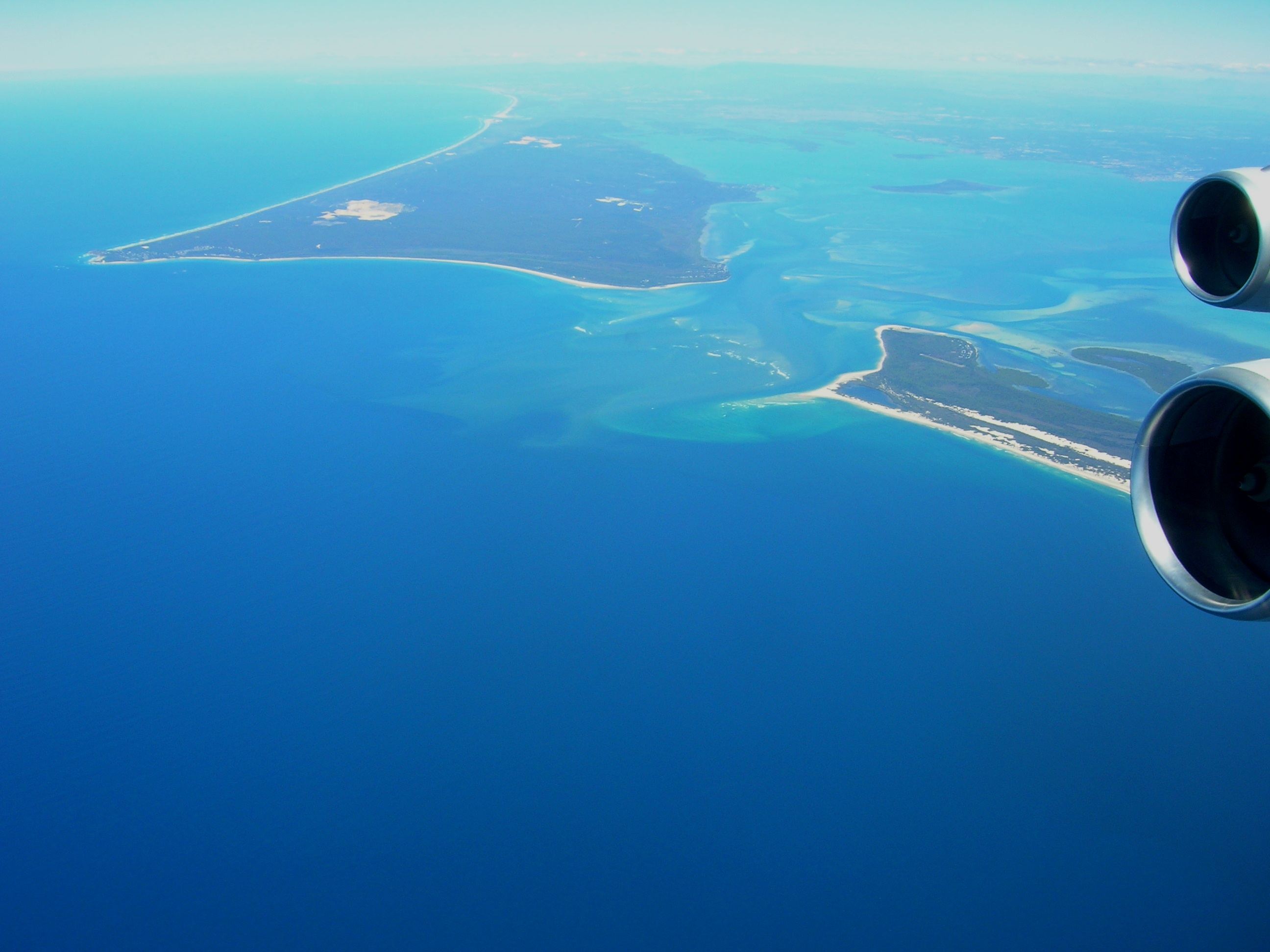 i090806 028